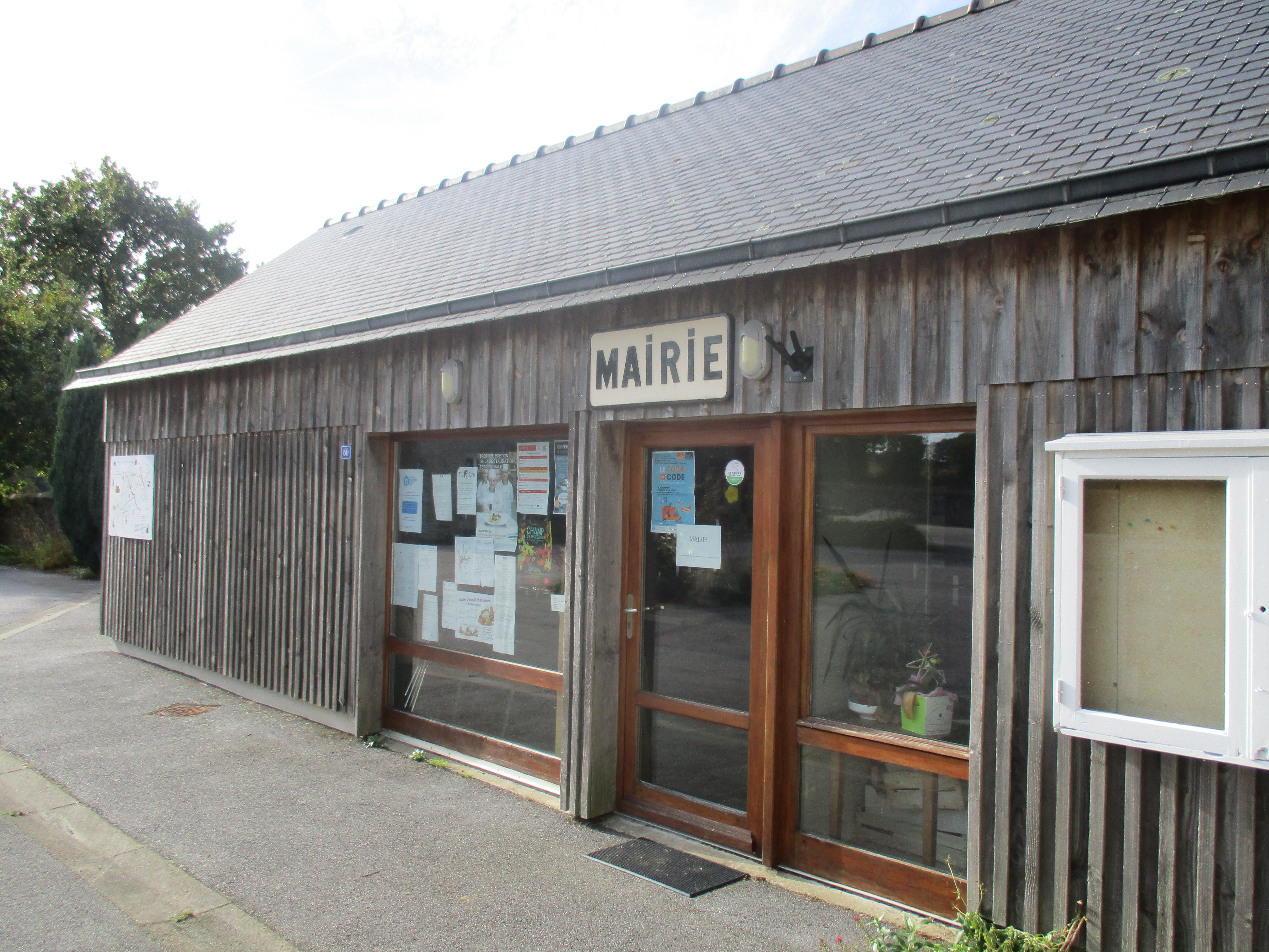 La mairie de Lescouët-Gouarec